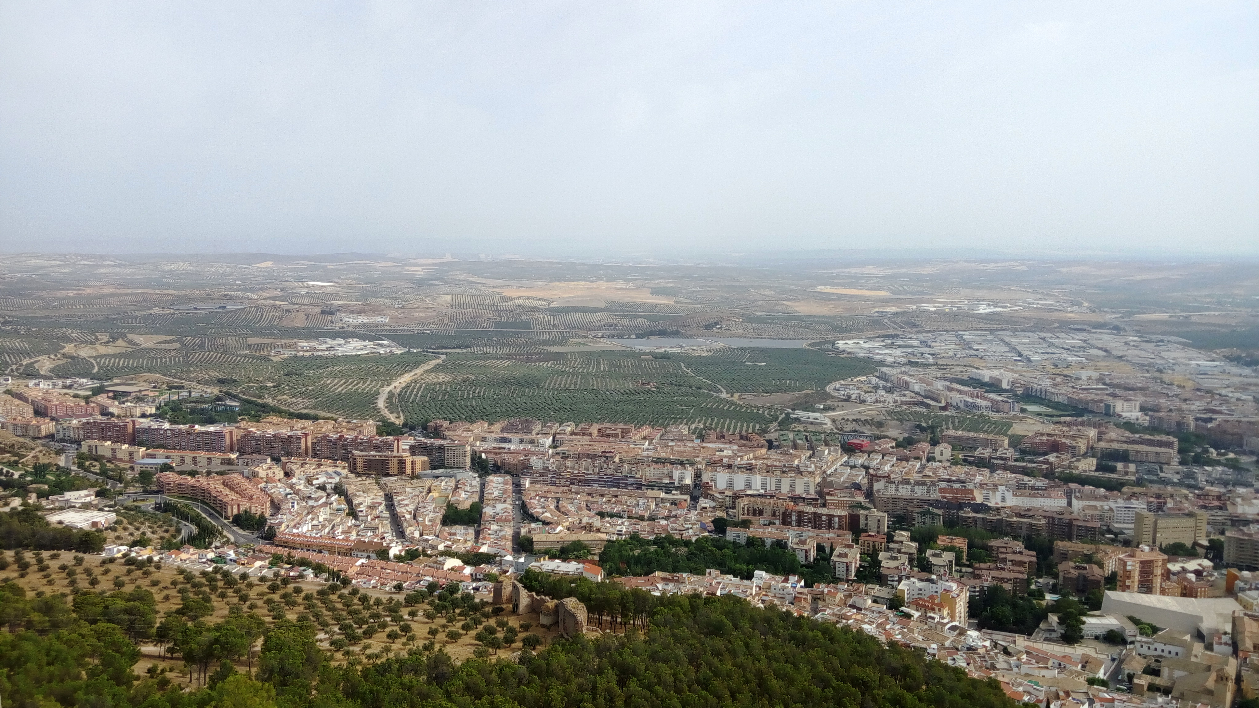 Изглед към Хаен от хълма Санта Каталина